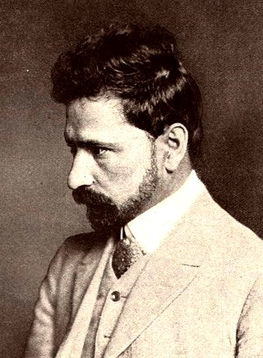 Русский политический деятель, бывший священник Георгий Аполлонович Гапон (1870-1906)